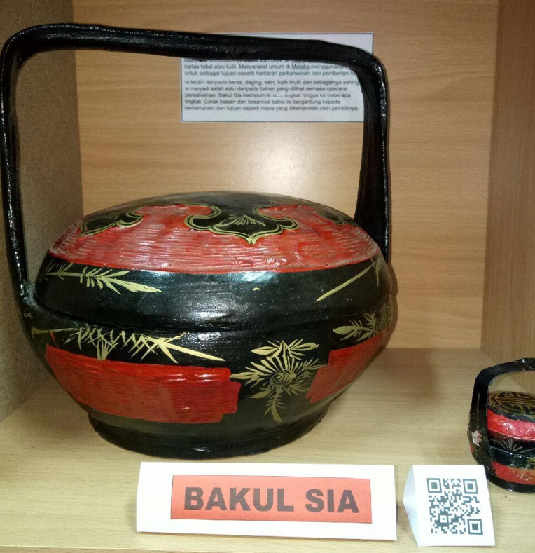 Bakul Sia